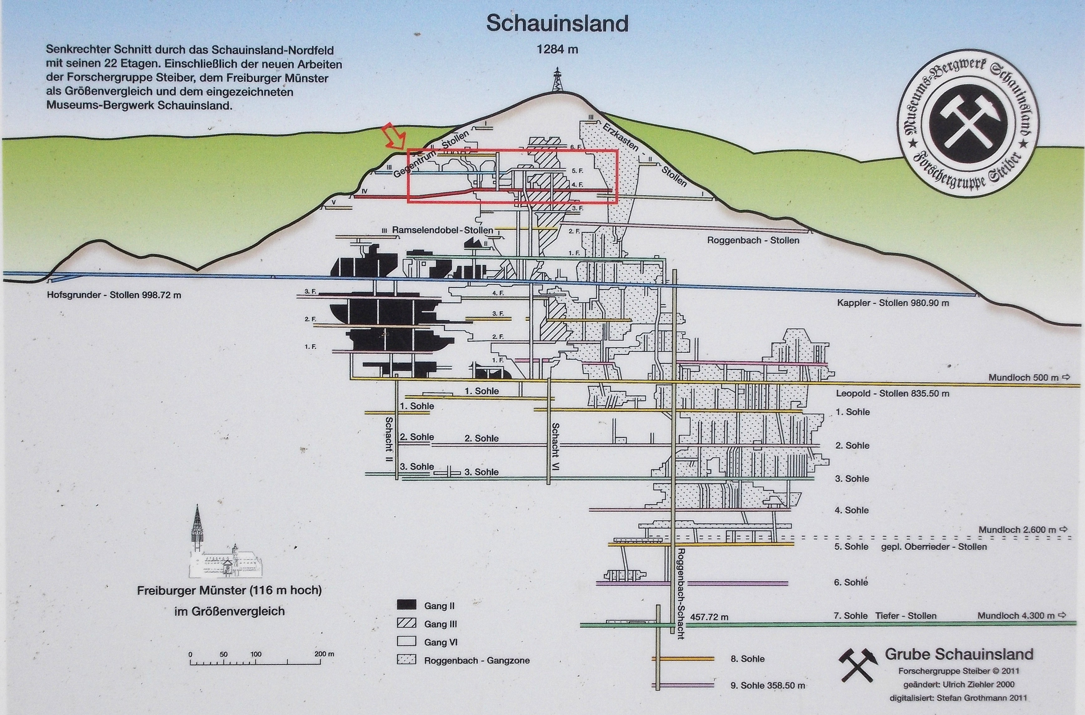 Freiburg i.Br. - Museumsbergwerk Schauinsland, Schautafel auf dem öffentlichen Weg zum Museumsbergwerk (deshalb der Hinweis auf "Panoramafreiheit")